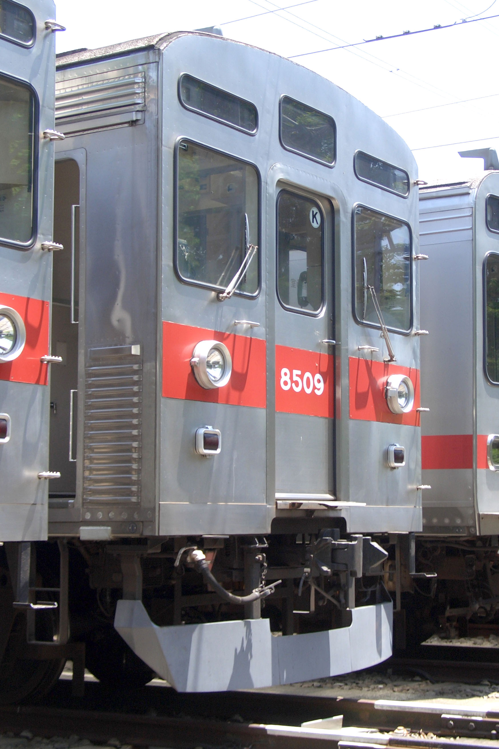 東急8500系8509号の排障器